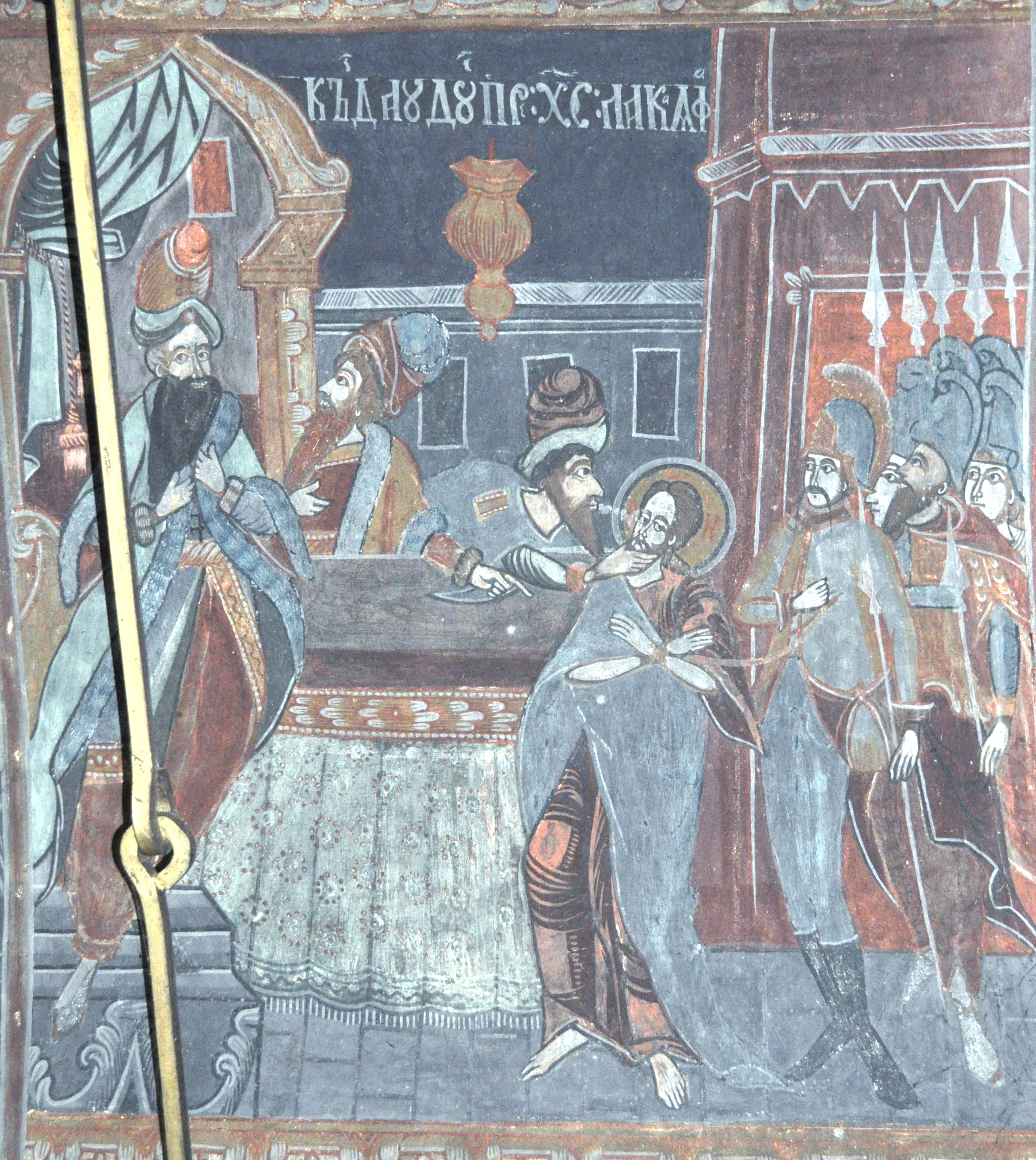 Biserica „Cuvioasa Paraschiva” din Țichindeal, județul Sibiu